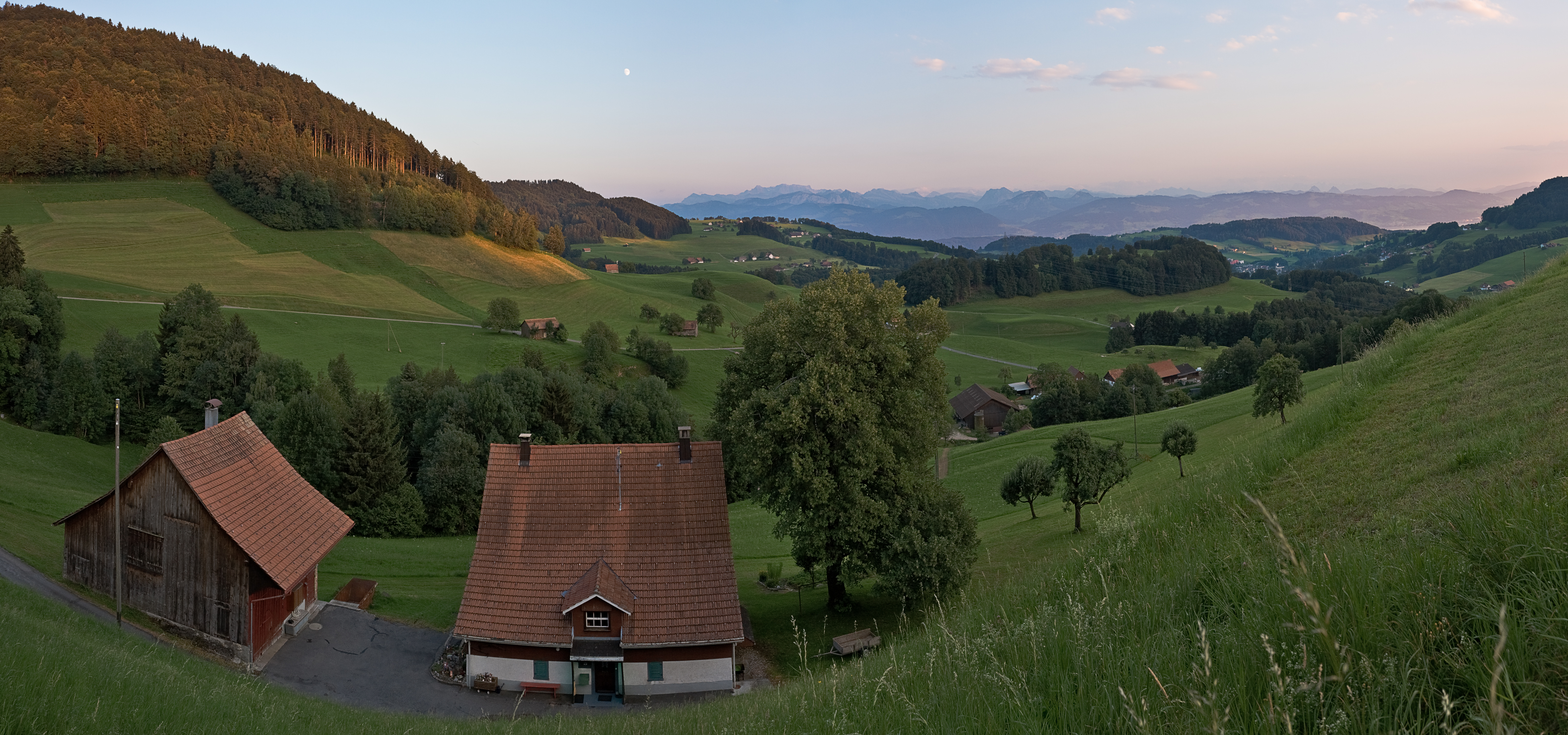 Aussicht vom Weiler Hischwil im Zürcher Oberland